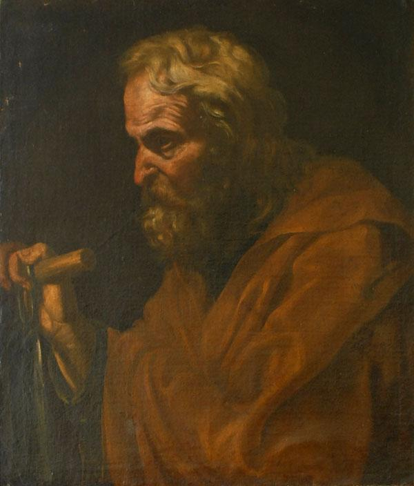 San Simeone